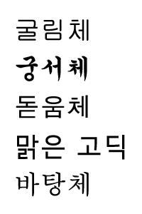 Hangul